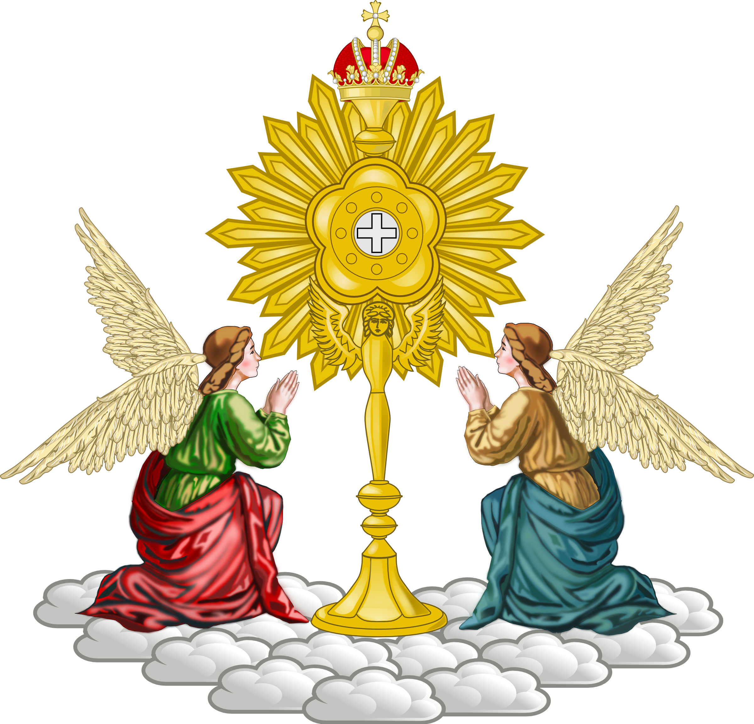 Emblemat mariawicki (wersja uproszczona)